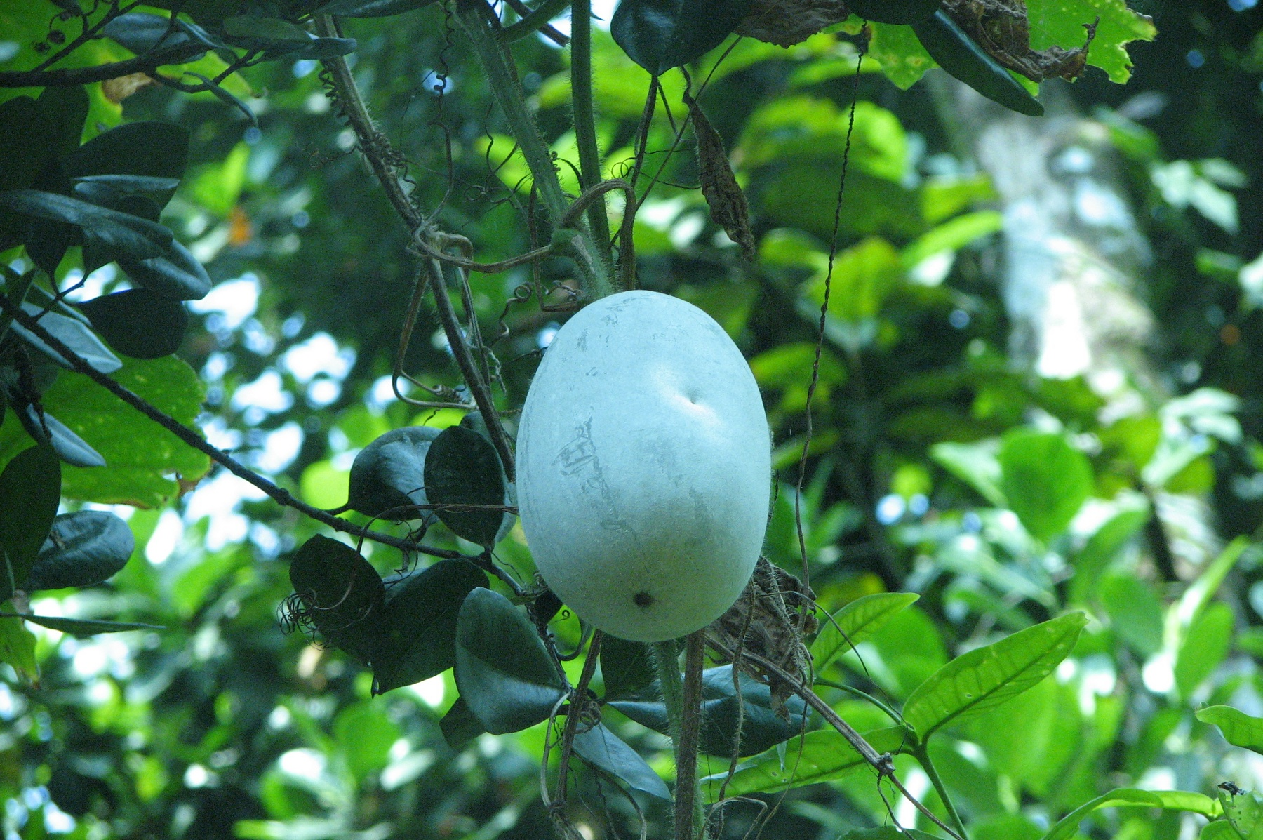 കുമ്പളങ്ങ